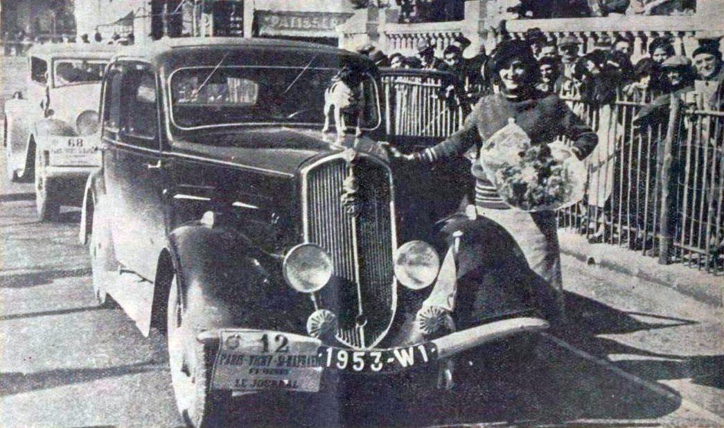 Olga Thibault, victorieuse du rallye Paris-Saint-Rapheal féminin 1935, sur Peugeot 201.